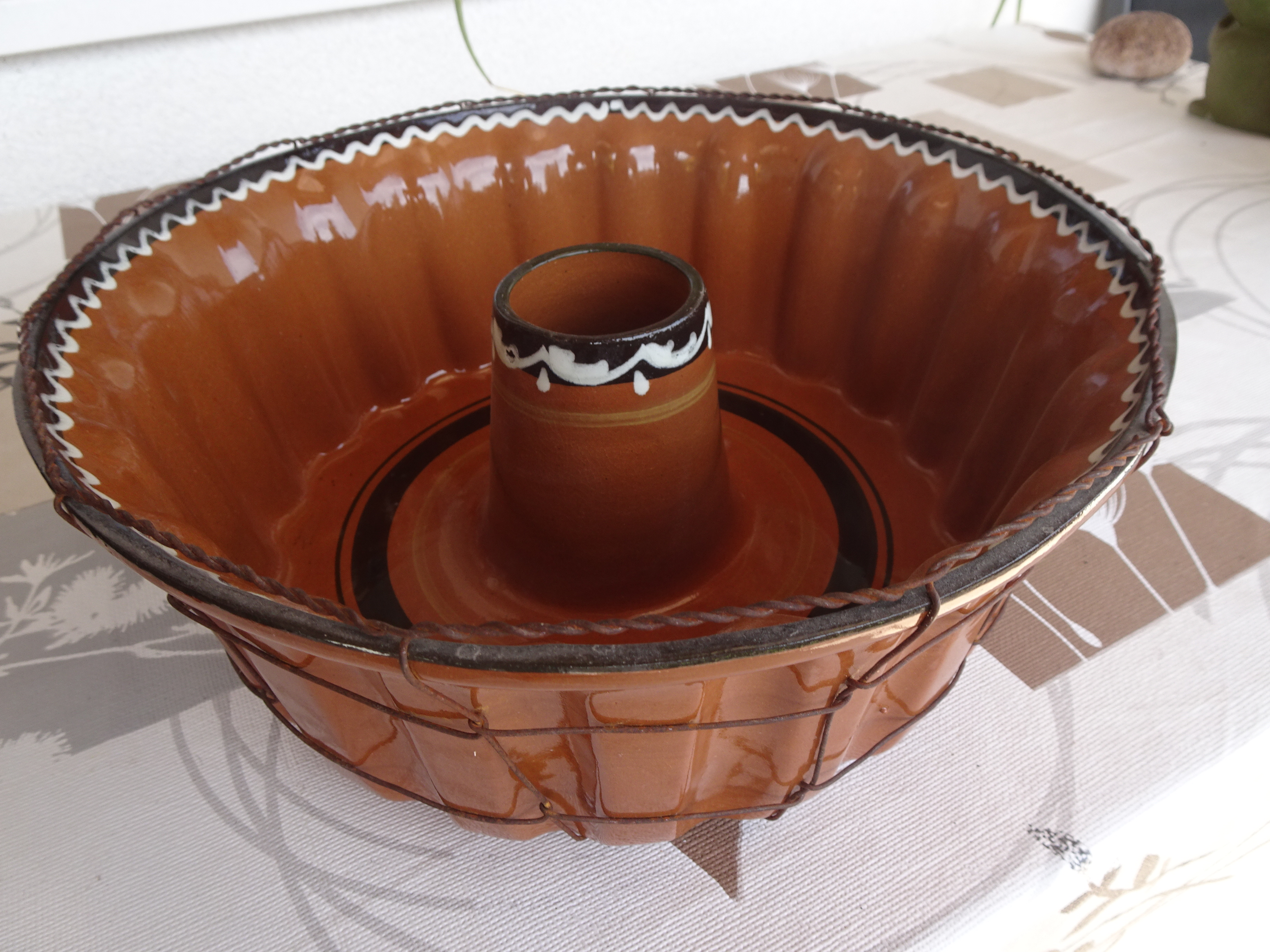 potičnik - model za peko slovenske potice